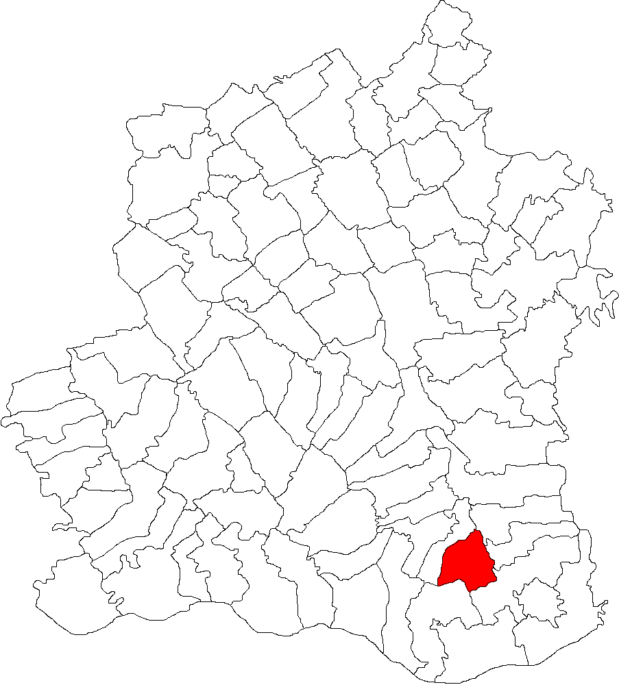 Categorie:Hărţi ale judeţului Teleorman